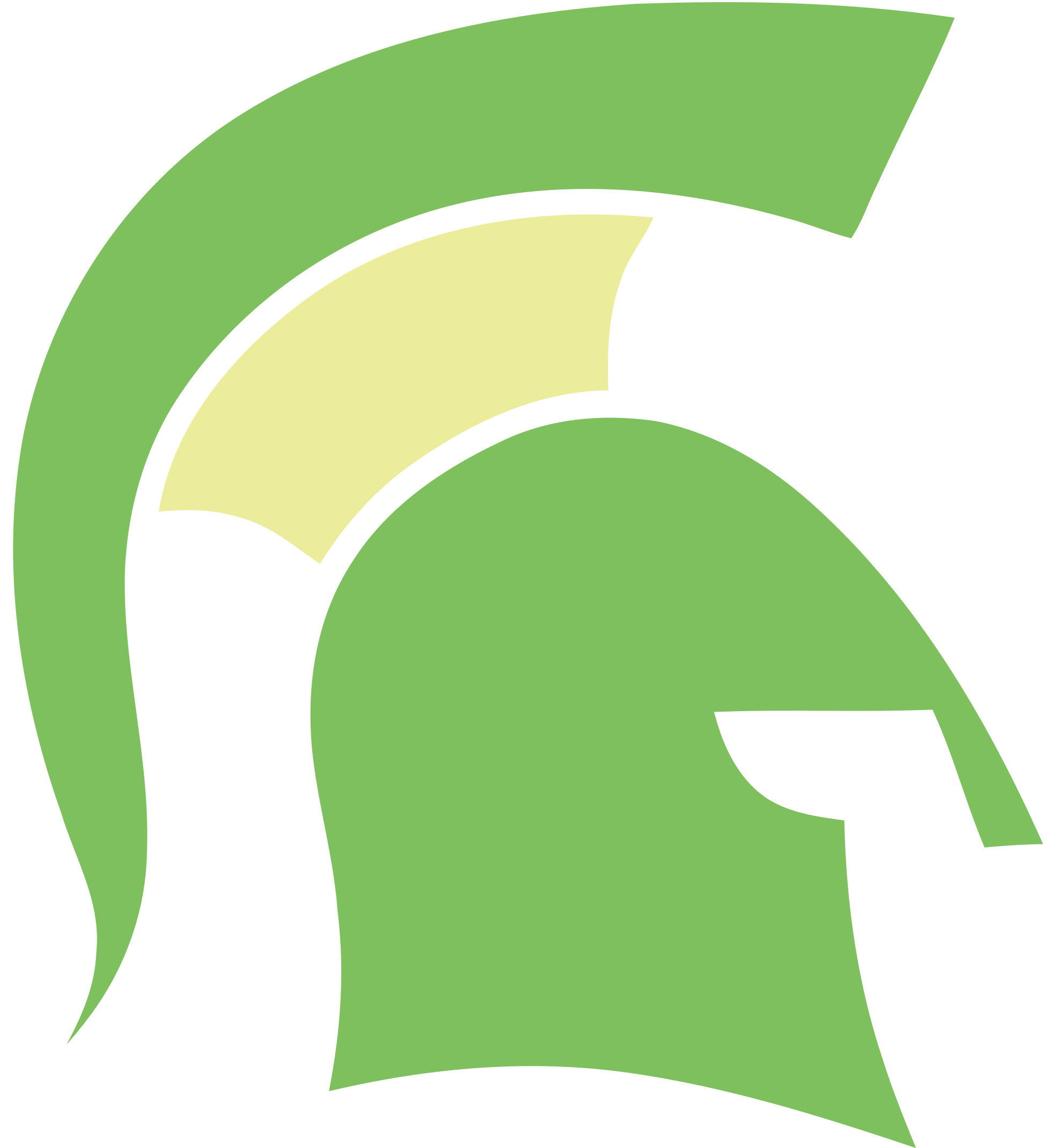 Logo Spartan Restaurant